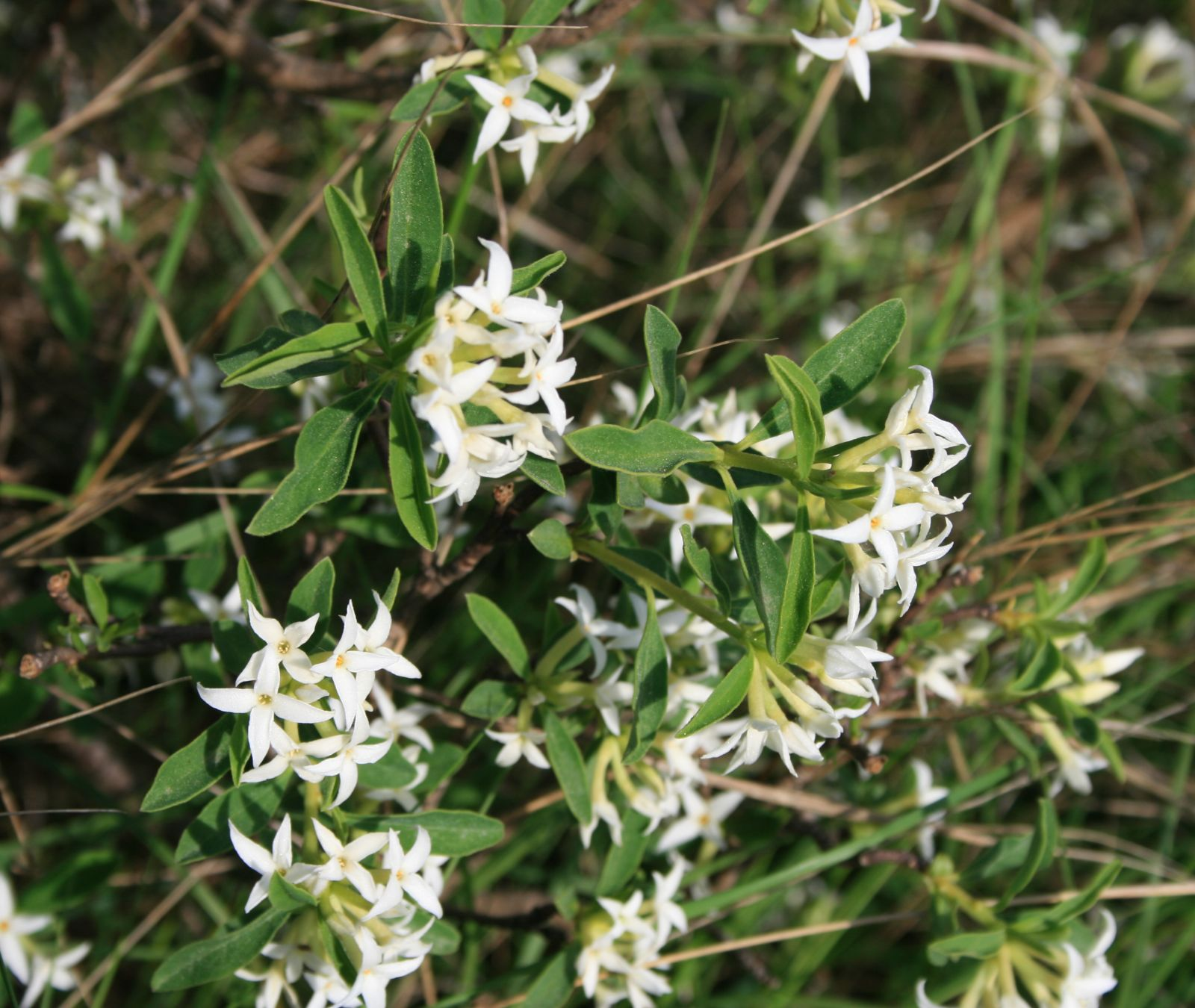 Berg-Seidelbast (Daphne alpina), Seidelbastgewächse (Thymelaeaceae) - Italien/Italia/Italy: Friuli-Venezia Giulia, Prov. Trieste, Monte Stena